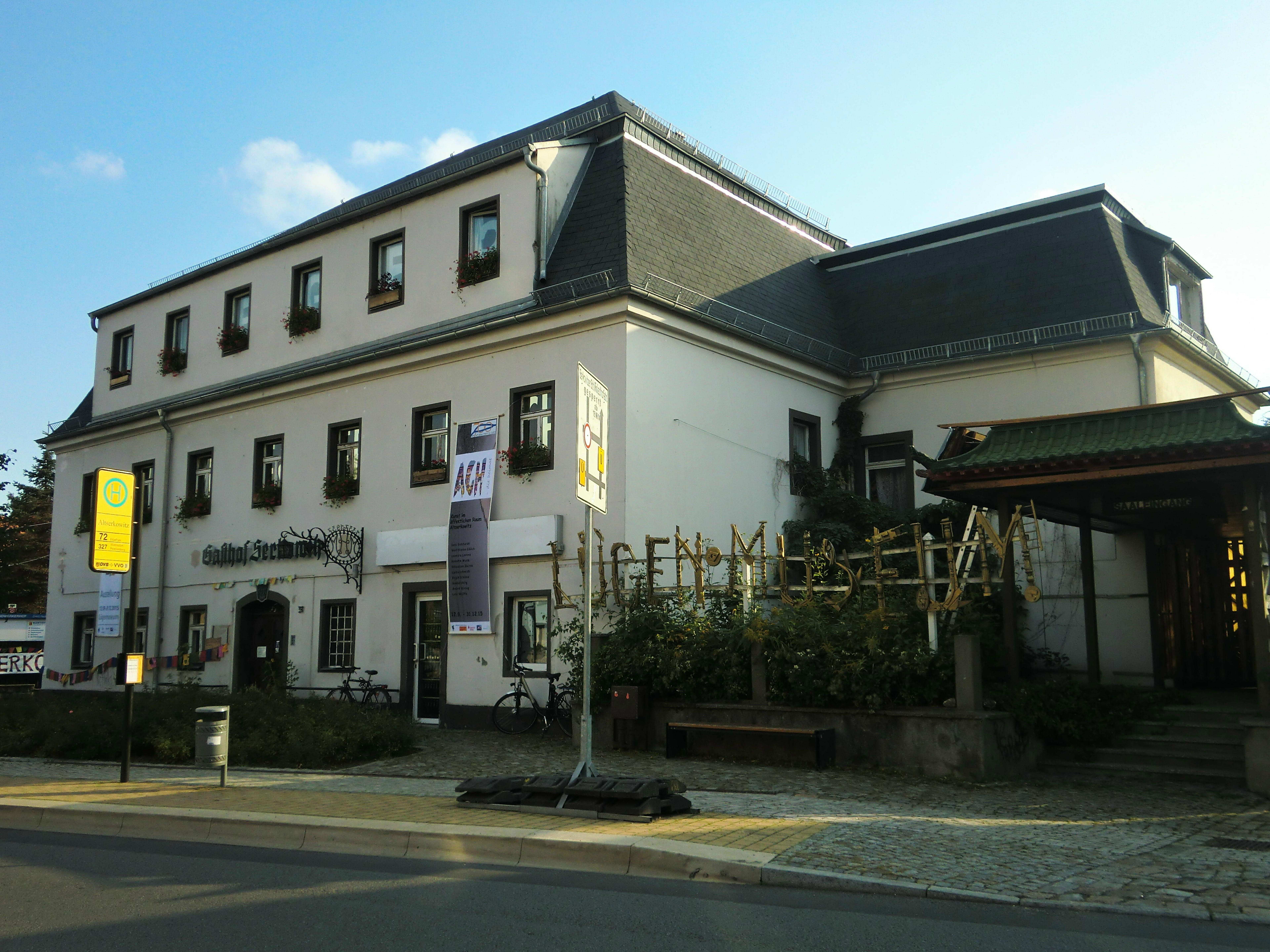 Serkowitz, Lügenmuseum